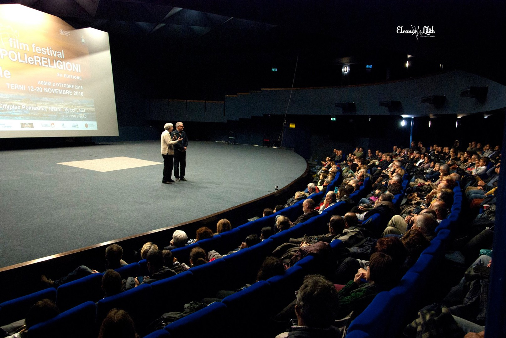 Popoli e Religioni - Terni Film Festival (platea)